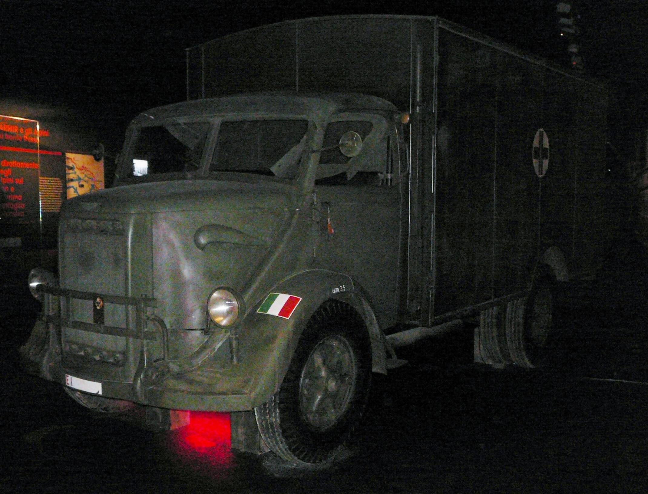 Ambulanza Bianchi Miles, presso le Gallerie di Trento